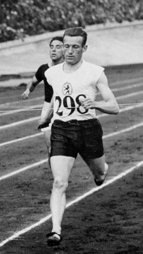 Olympische Spelen 1928 Amsterdam, Nederland : de Nederlander H.A. Broos.